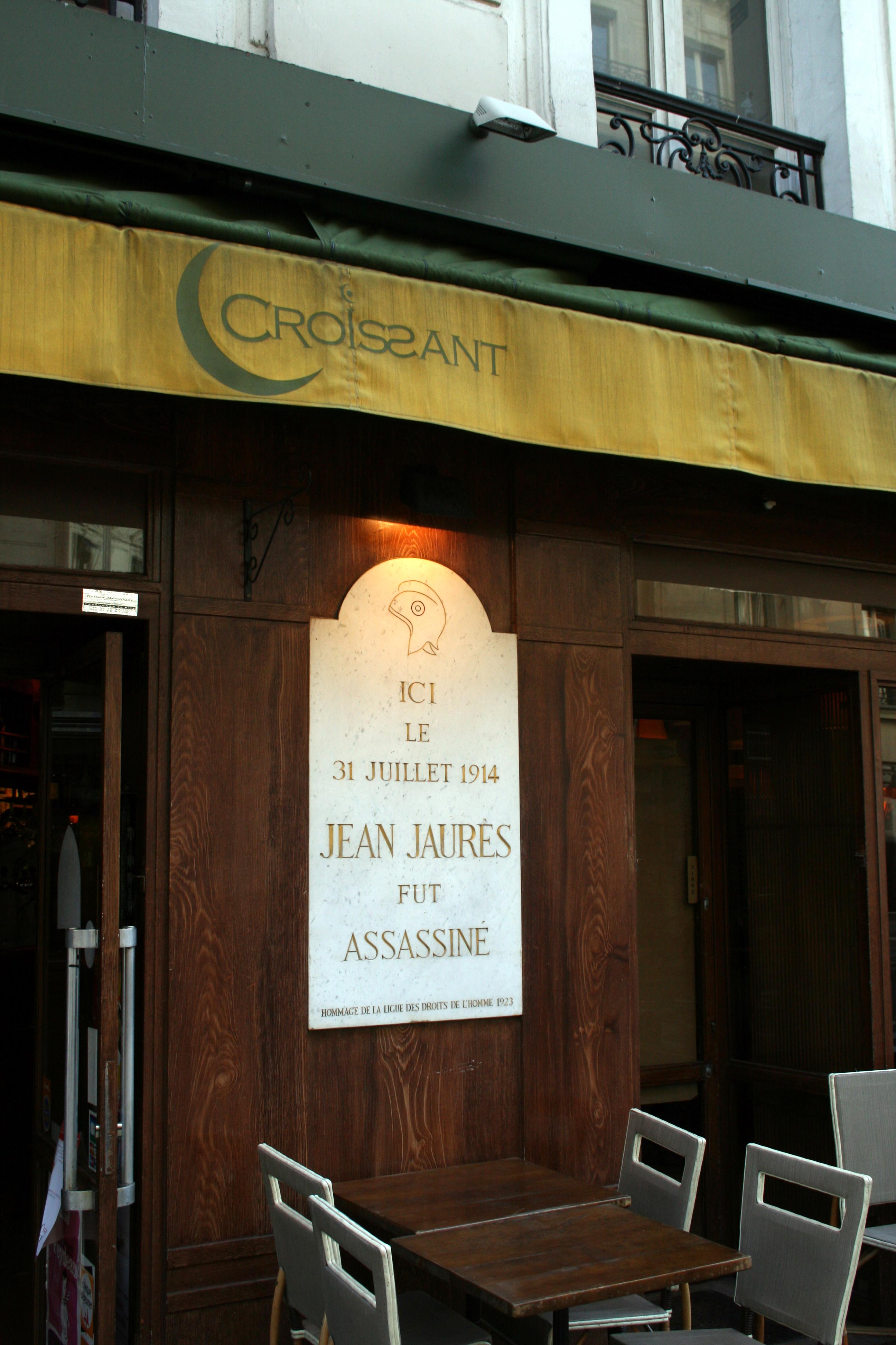 Plaque commemorative de l'assassinat de Jean Jaures au café Croissant à Paris